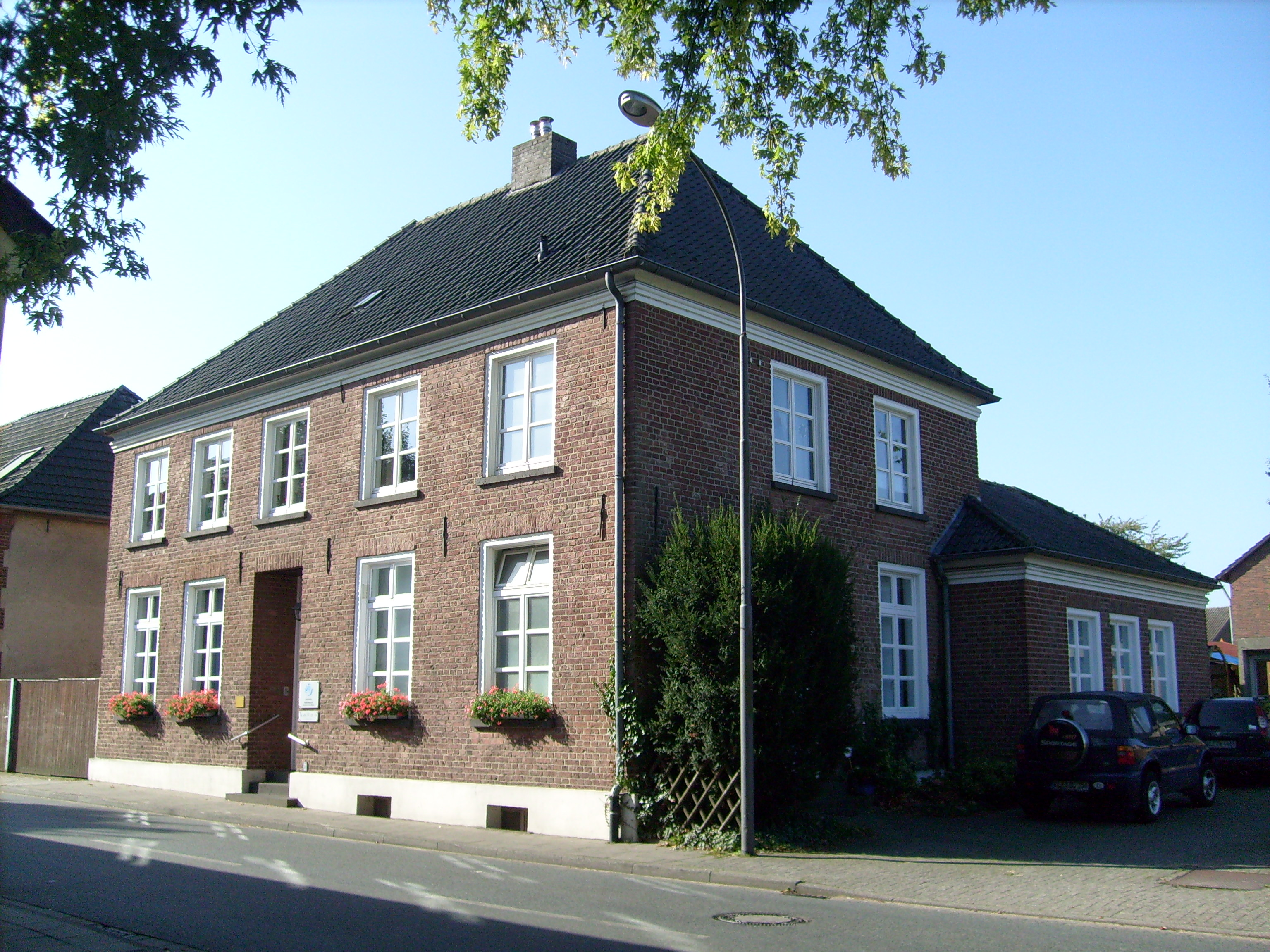 Uedem, "Alte Kaplanei", Viehstraße 17This is a photograph of an architectural monument., no. A/16/07/88